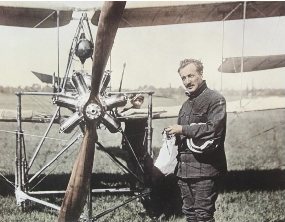 Photographie de l'aviateur suisse Armand Dufaux